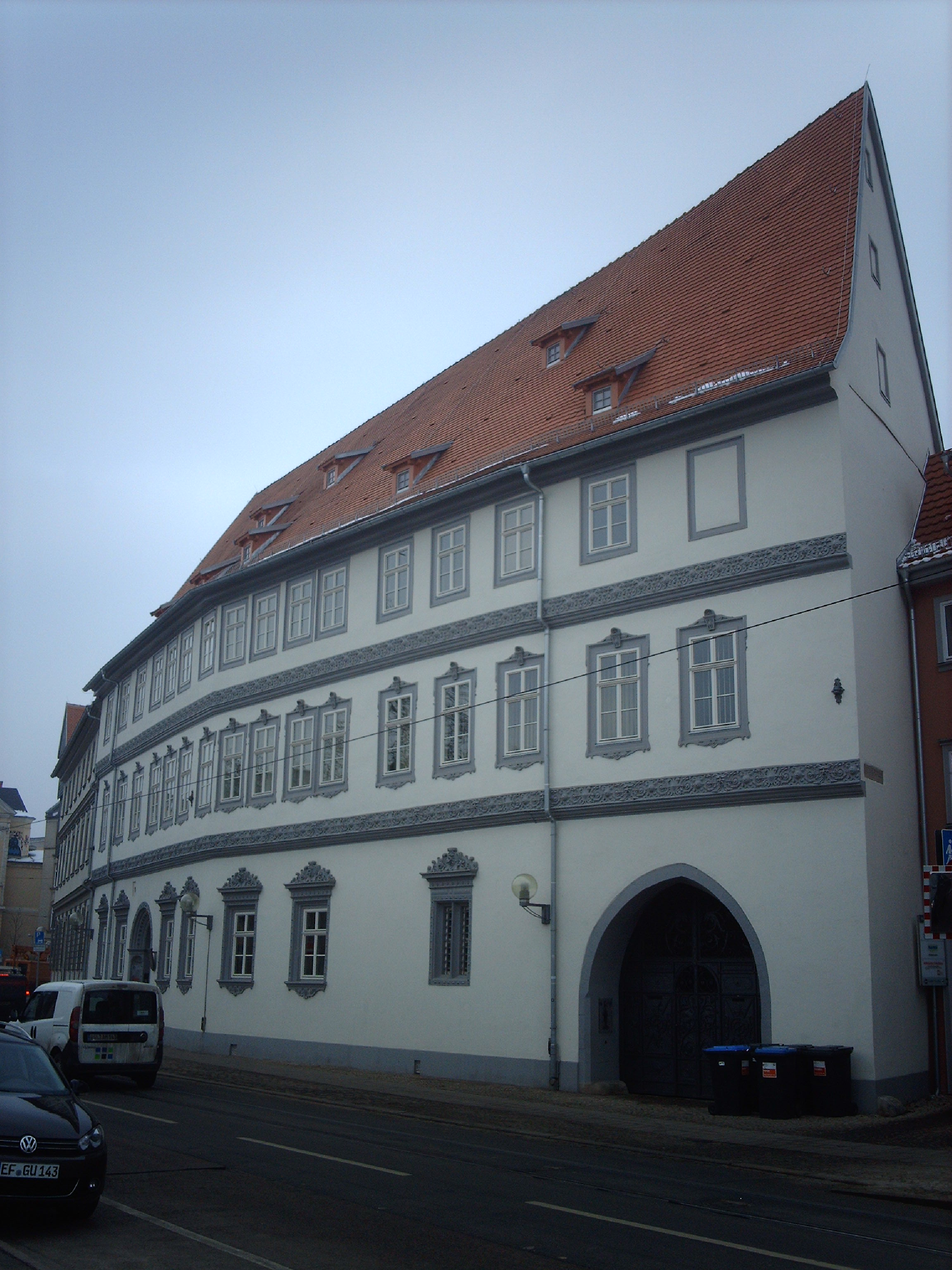 Vierherrnhaus in der Regierungsstraße 64 in Erfurt, auch genannt "Haus Zum Bunten Schiff".